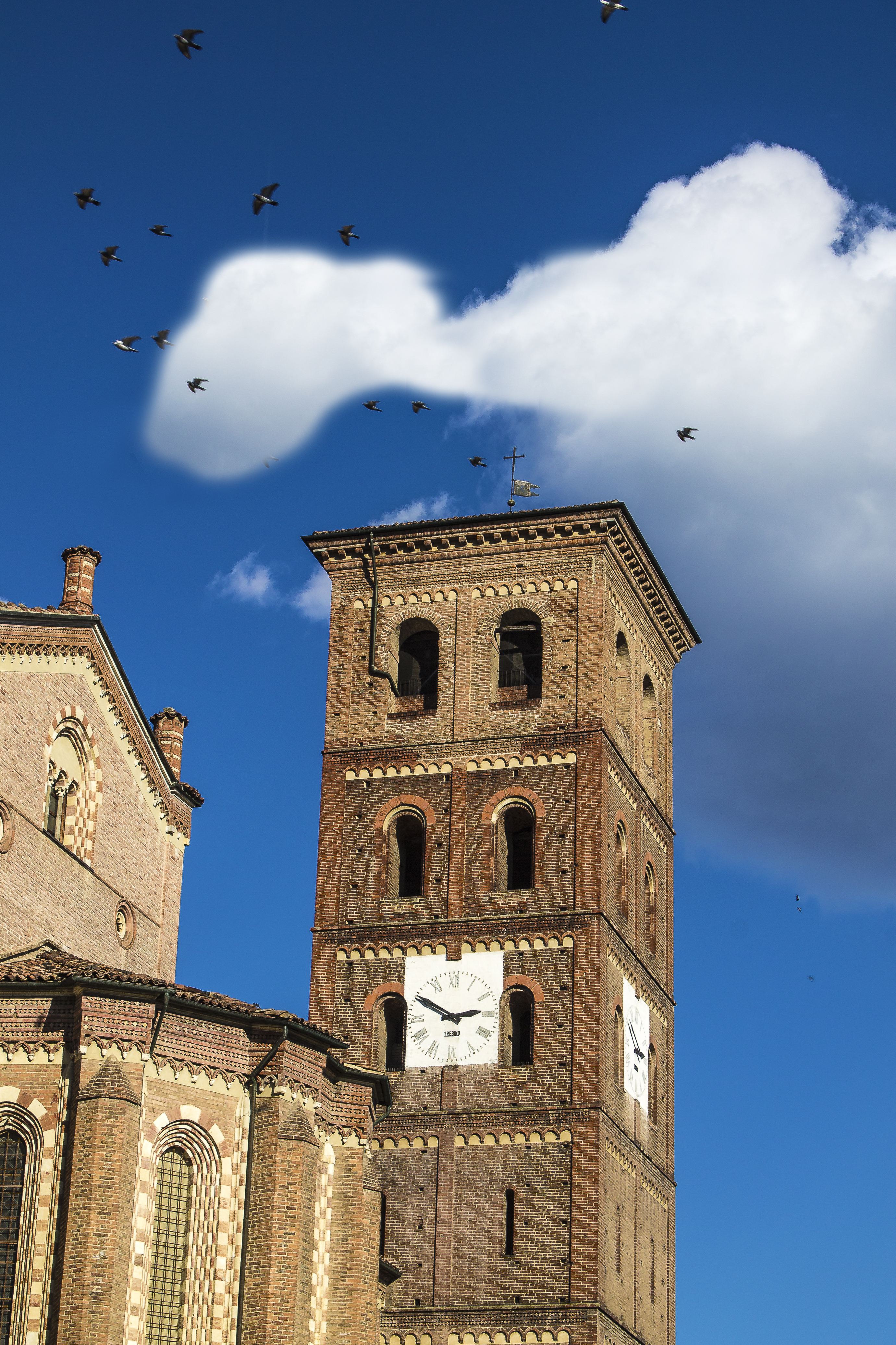 Complesso Episcopale della Cattedrale This is a photo of a monument which is part of cultural heritage of Italy.